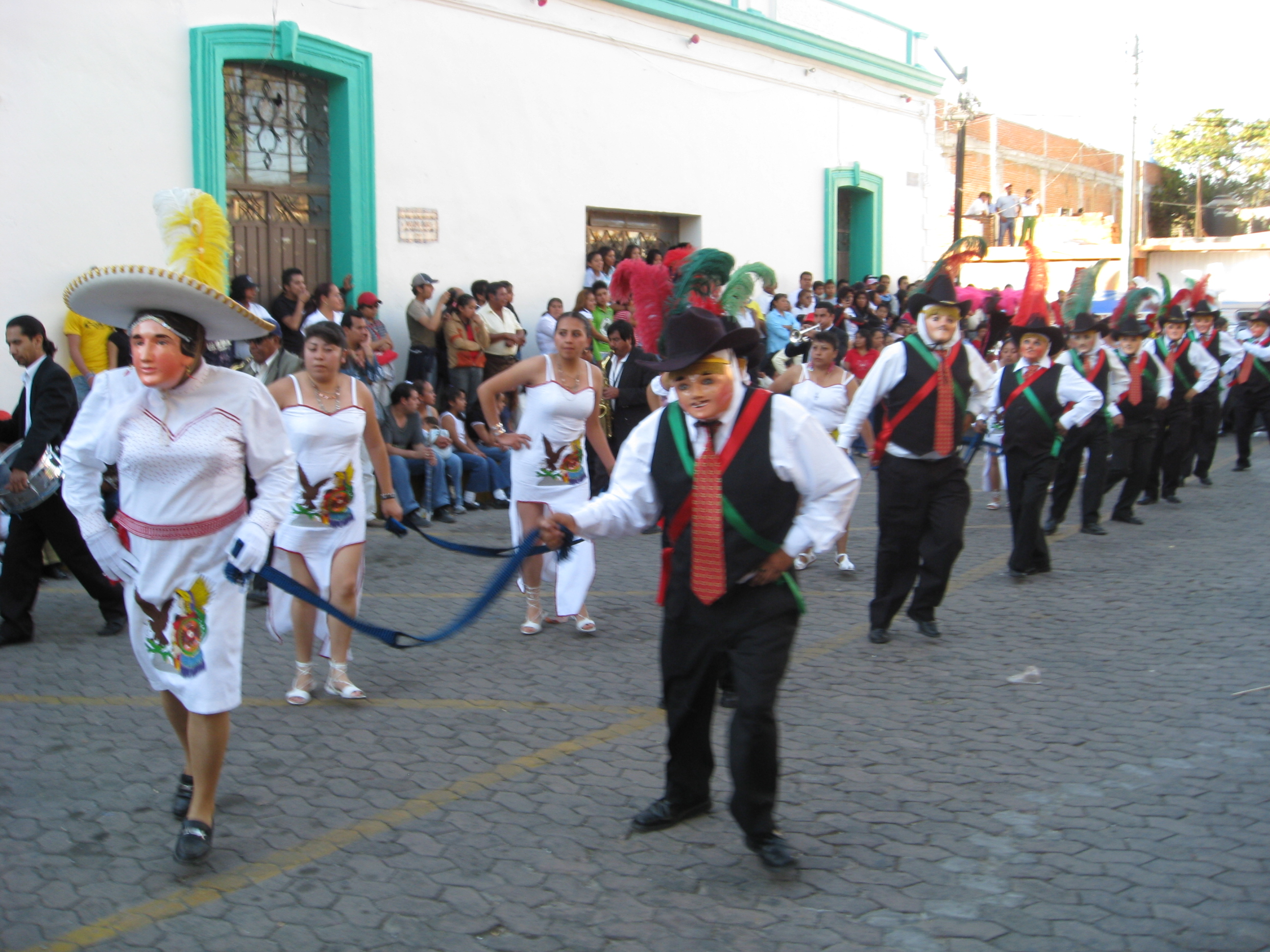 El Cuadro del Carnaval de Papalotla de Xicohténcatl en el zócalo.